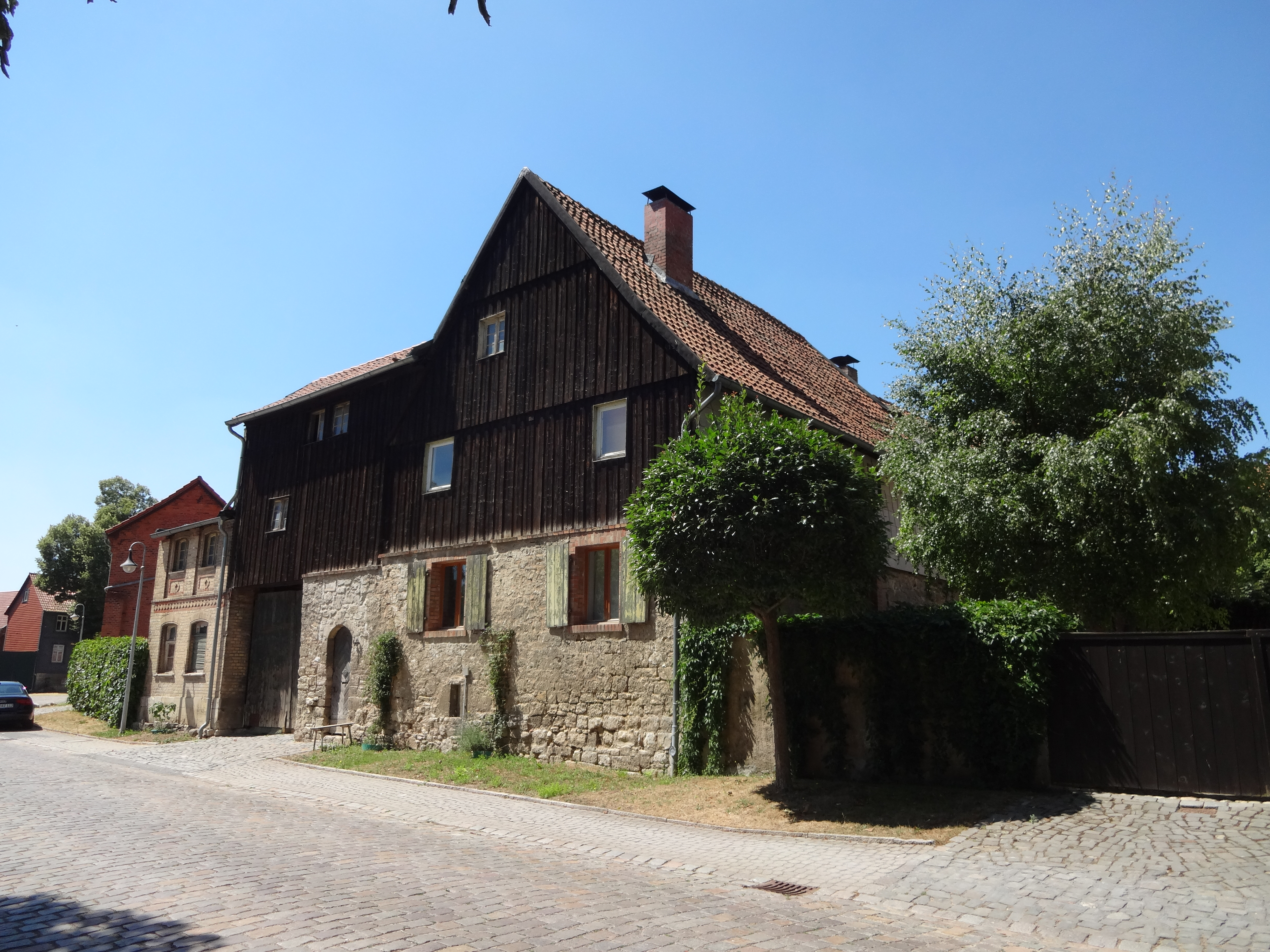 denkmalgeschütztes Bauernhaus in der Hauptstraße 49 in Vogelsdorf (Gemeinde Huy)